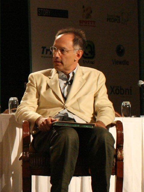 Michael Moritz at TechCrunch40